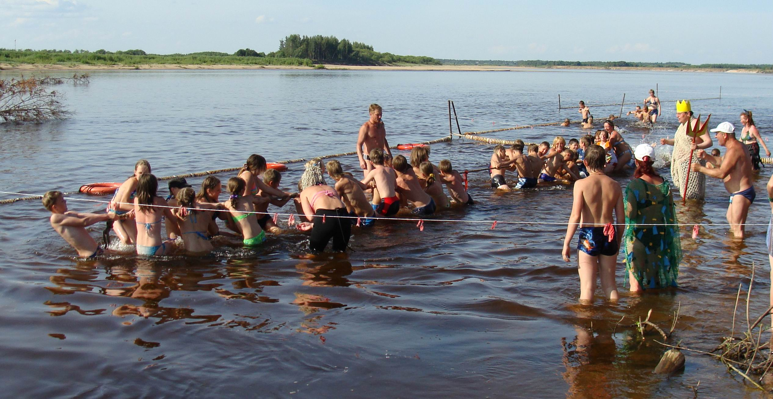 День Нептуна в ДОЛе. Вожатые проводят День Нептуна в ДОЛе.